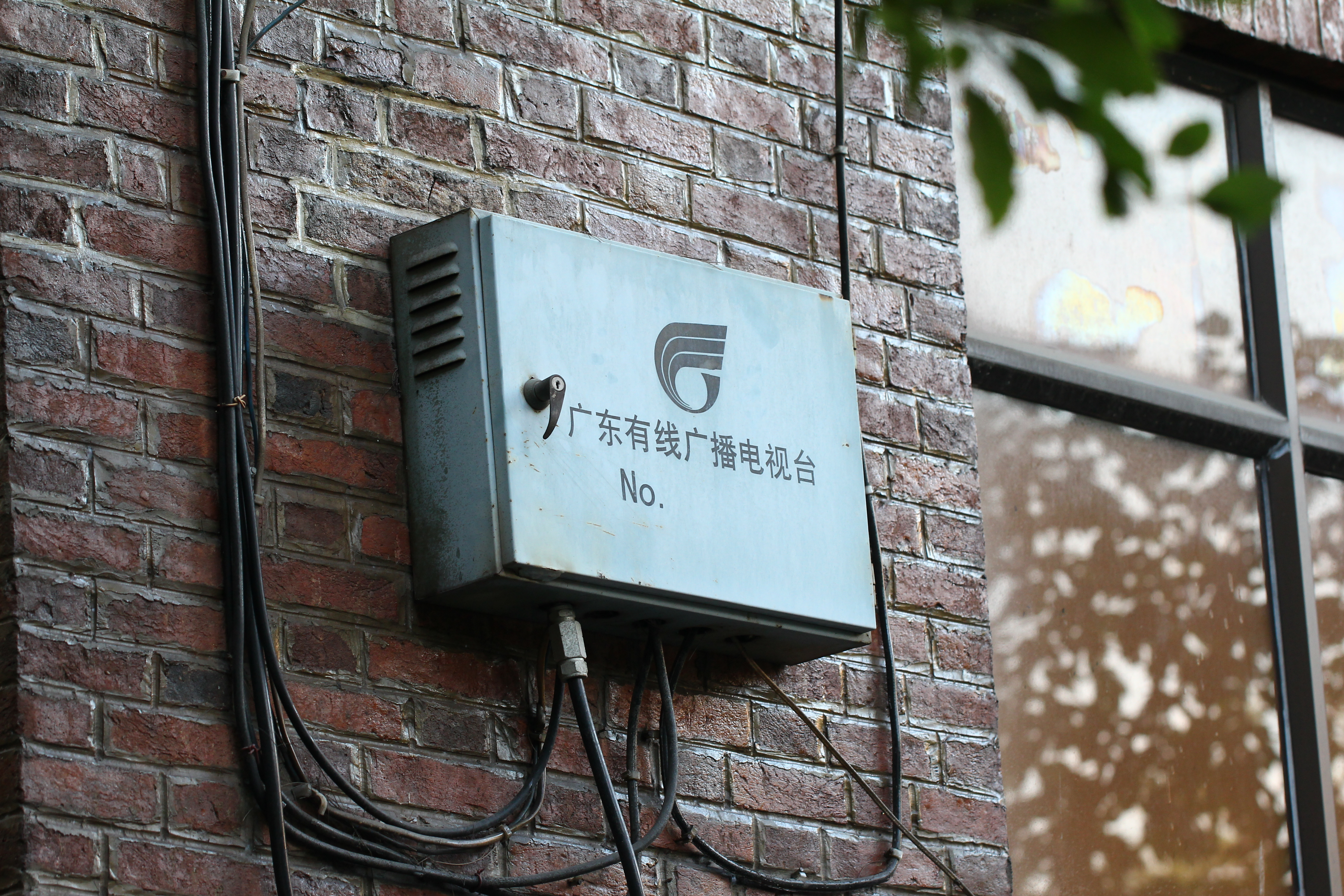 廣東有線廣播電視台分線箱。